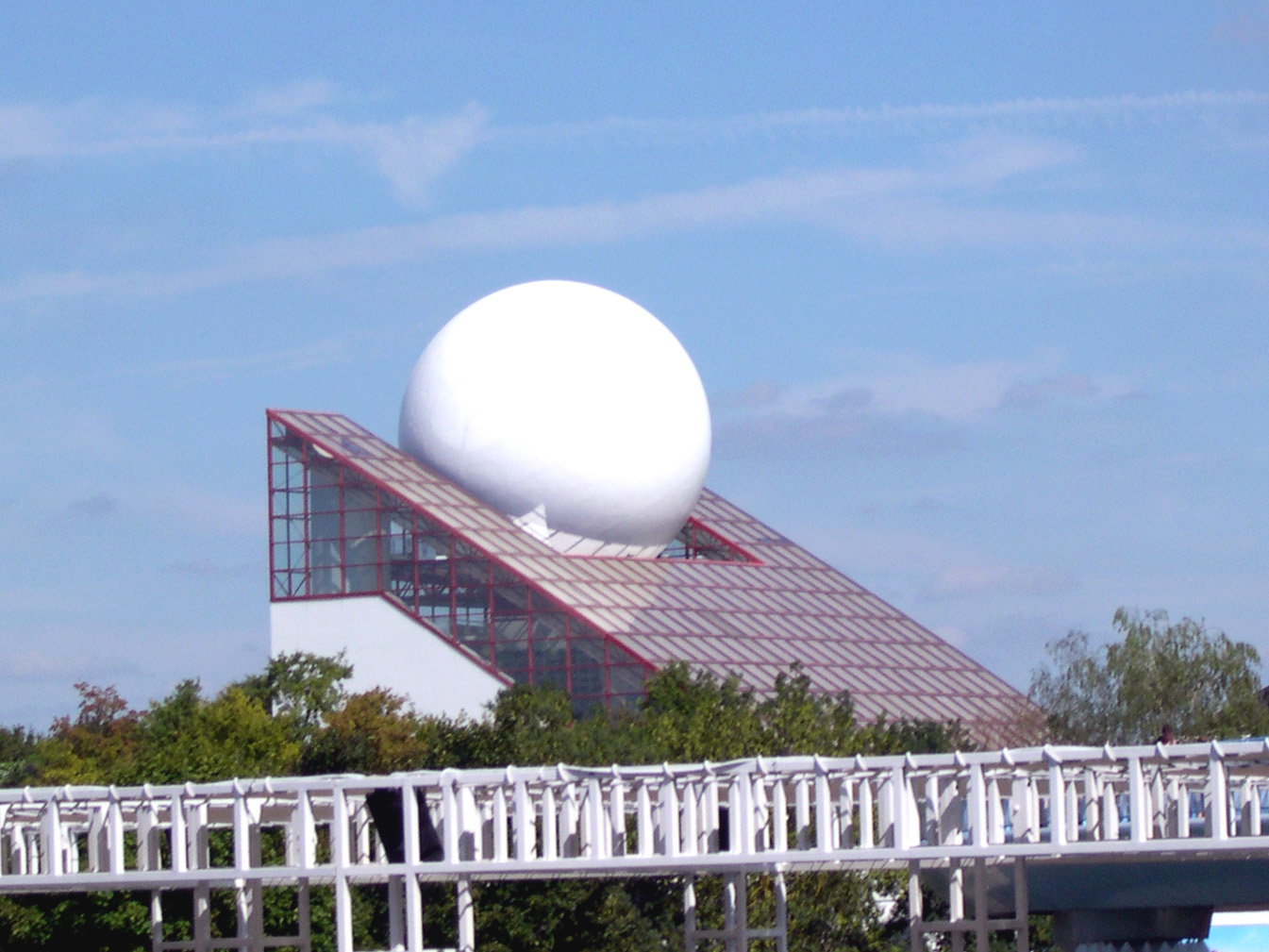 Le Pavillon du Futuroscope. Photo prise en août 2006.